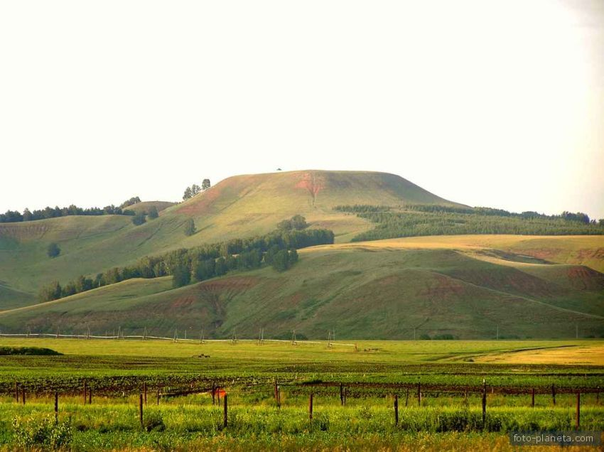 Чатыр-Тау заказник, Азнакаевский район This image is related to the protected area of Russia number 1610010